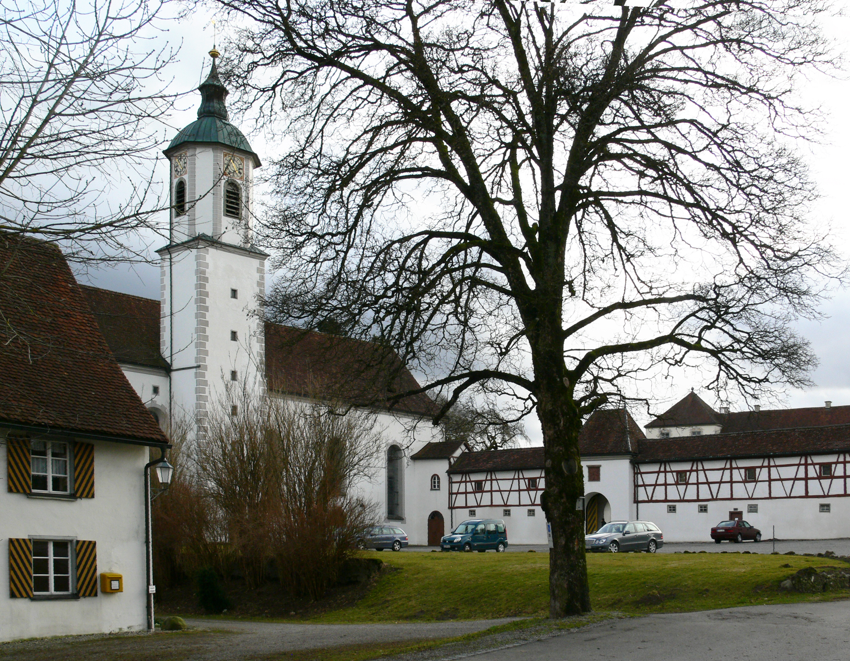 Pfarrkirche (ehem. Stiftskirche) St. Maria, Schloss Zeil, Leutkirch im Allgäu